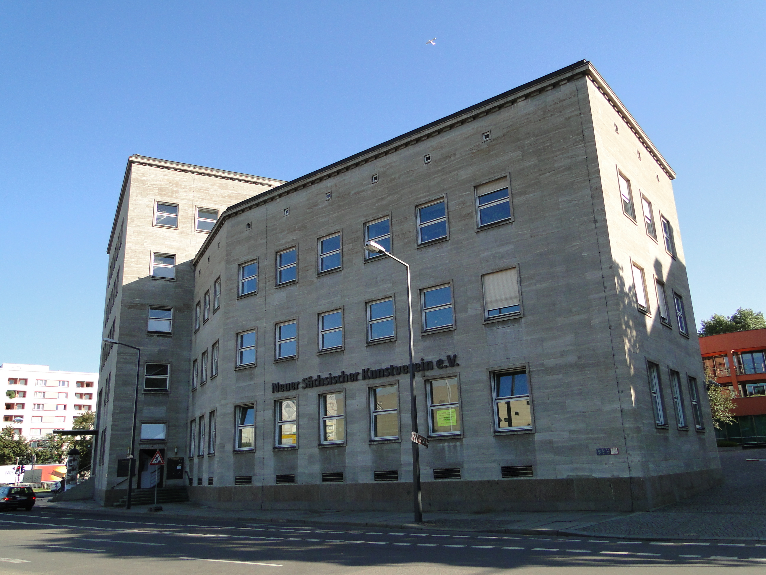 Ehemalige Reichsbank in Dresden